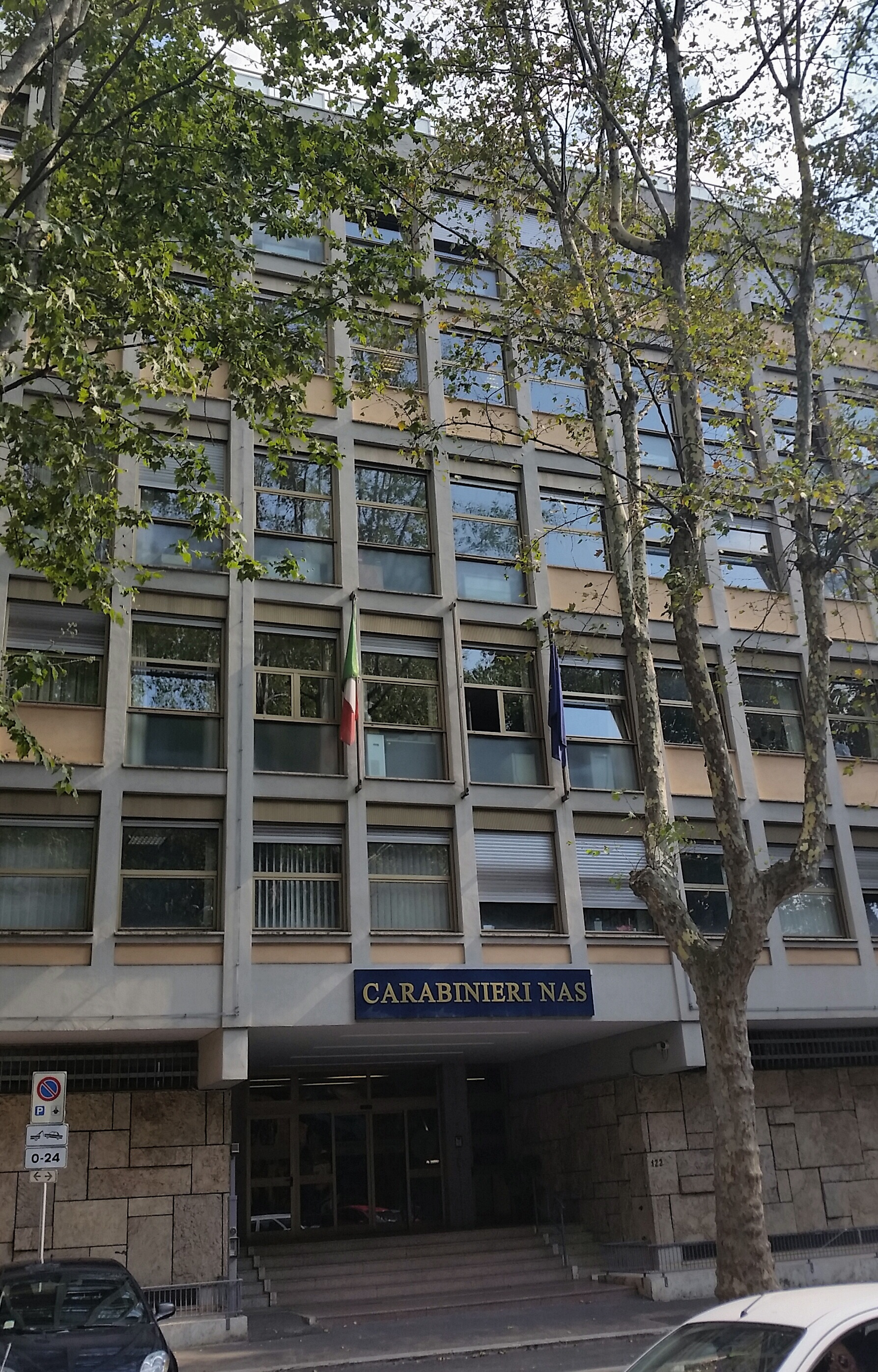 Sede del Nucleo Antisofisticazione e Sanità dell'Arma dei Carabinieri, a Viale dell'Aeronautica, 122, Roma